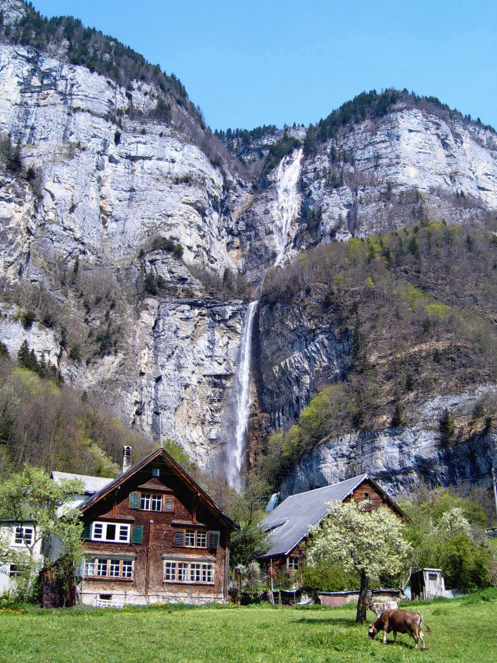 Seerenbachfall, Betlis, Amden (Switzerland)